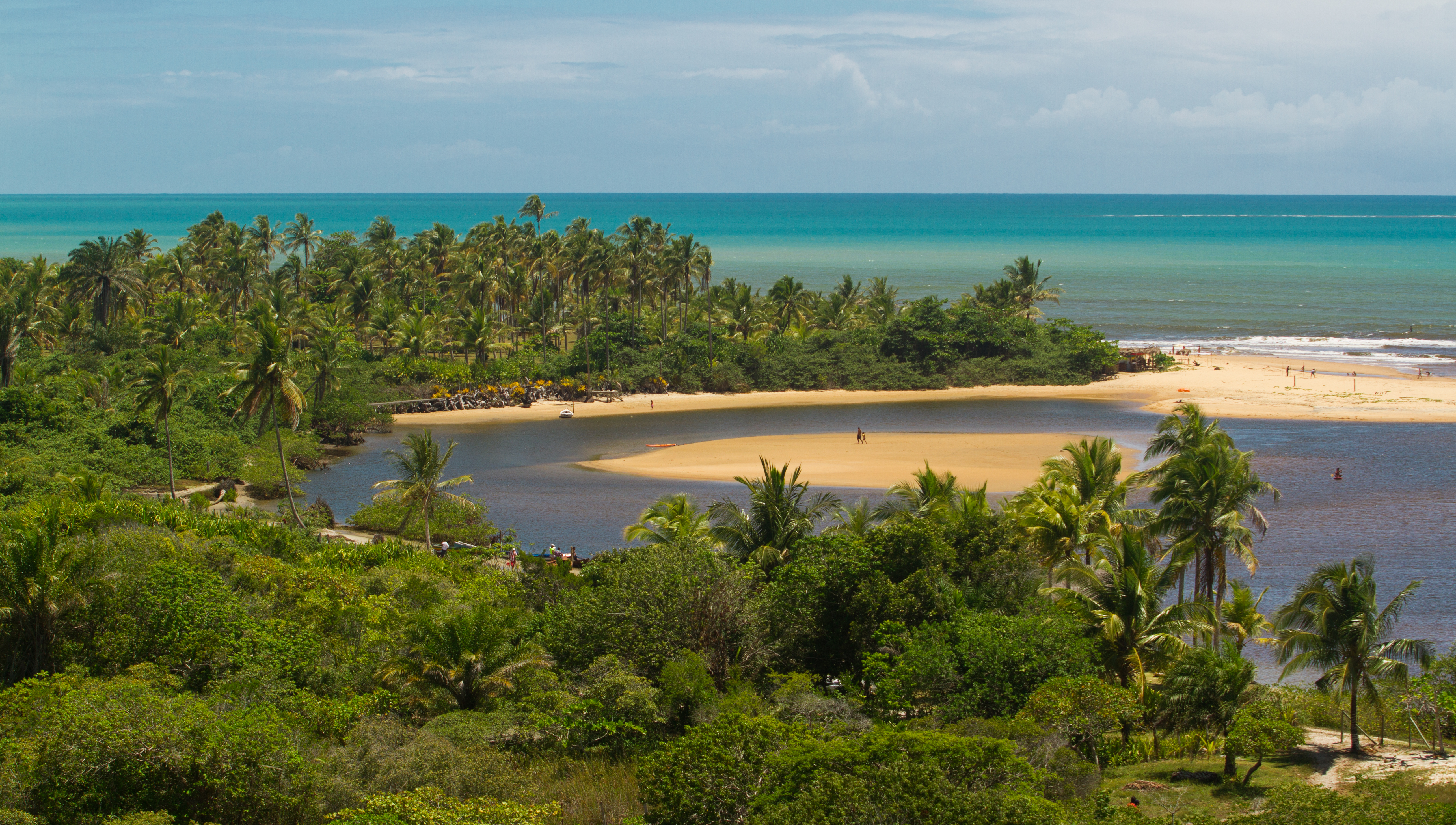 Caraíva é umas das mais belas praias do litoral sul de Porto Seguro, Bahia. Fica localizada entre o mar e o rio Caraíva, que dá nome ao vilarejo.